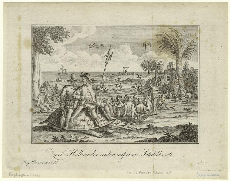 Zwei Hollaender reuten auf einer Schildkroete.